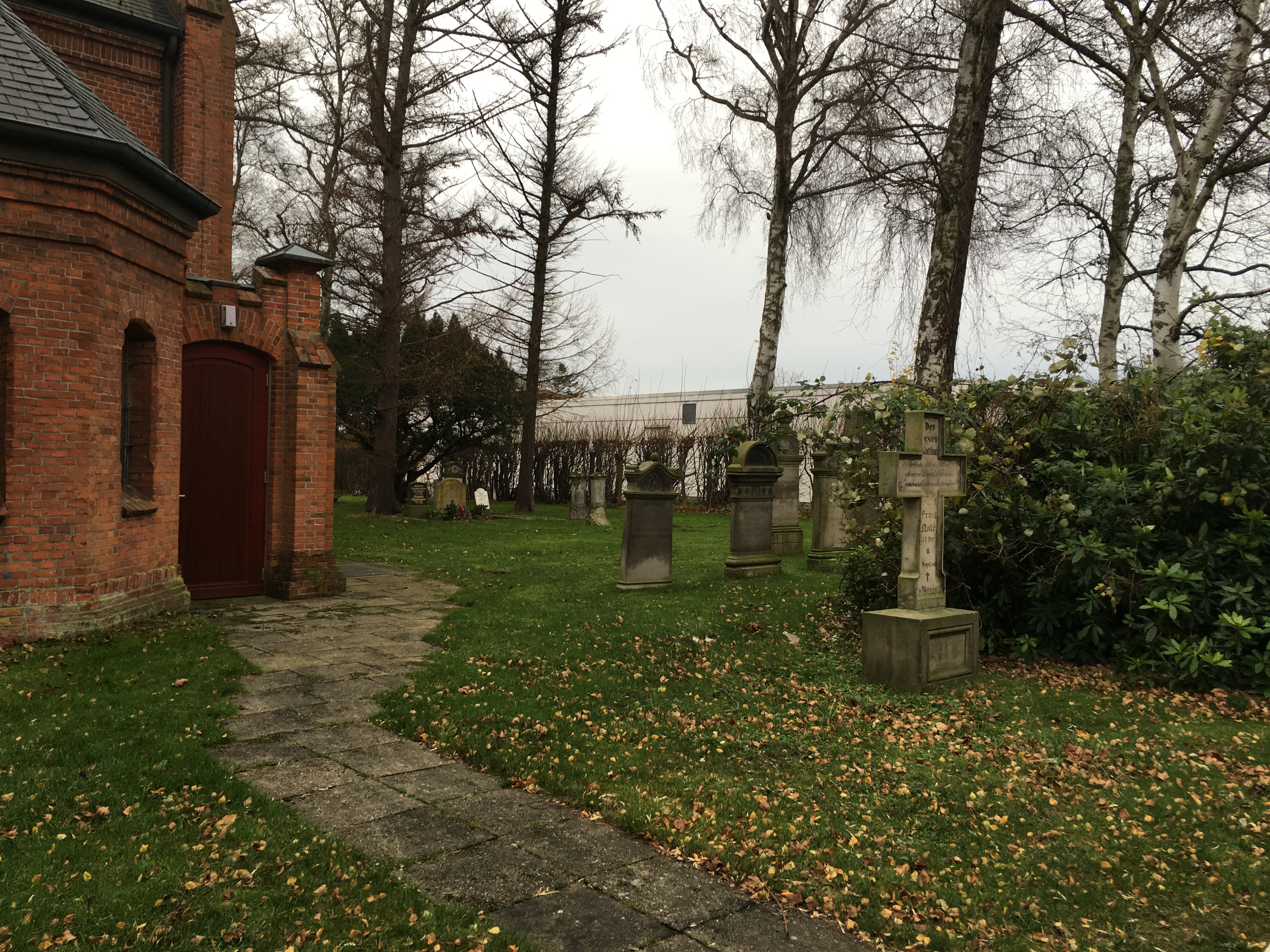 Graffsteen bi de Kark in Döös